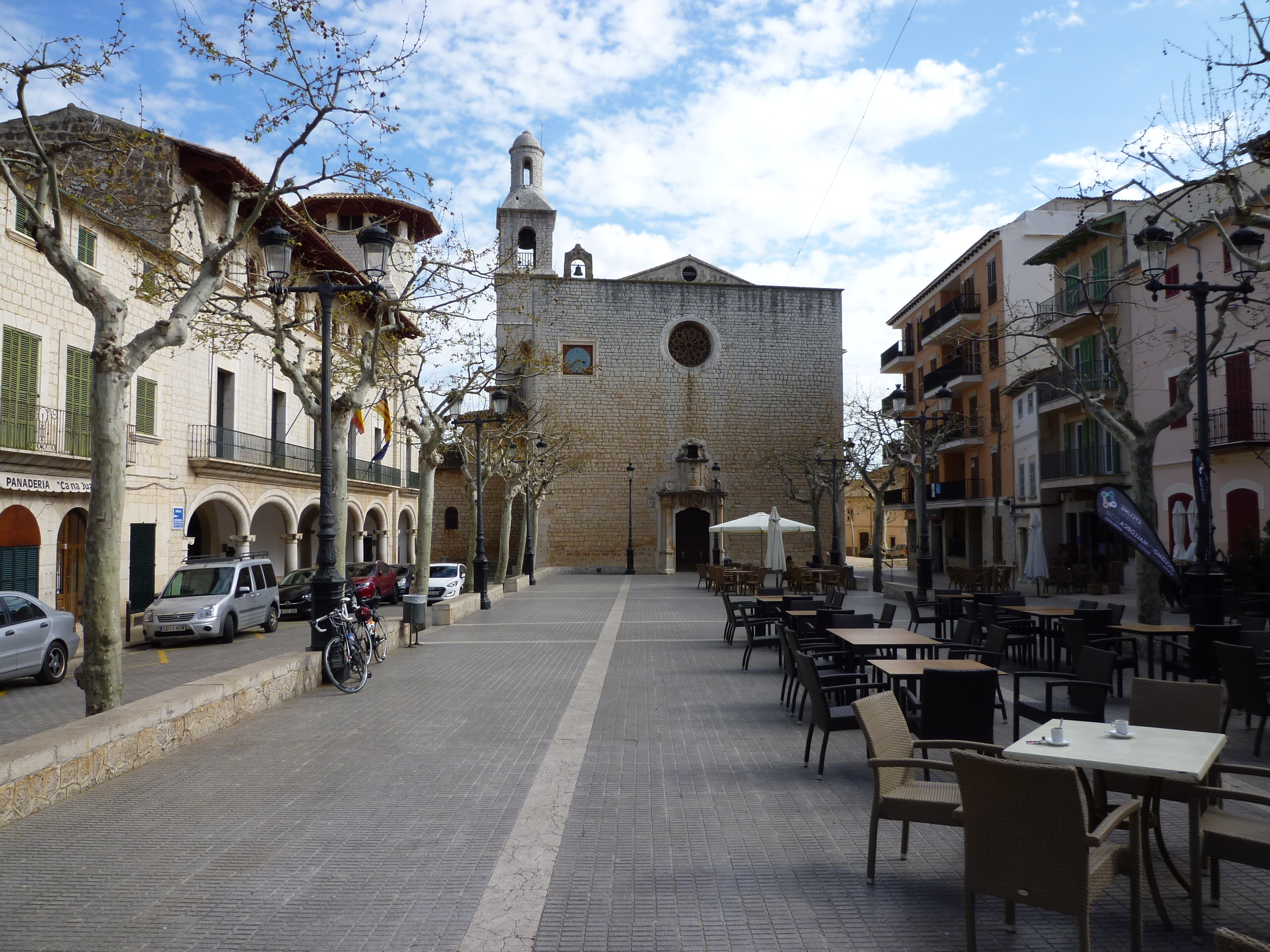 Blick über den Hauptplatz von Alaro mit Straßencafes und Kirche. Mallorca/Spanien.